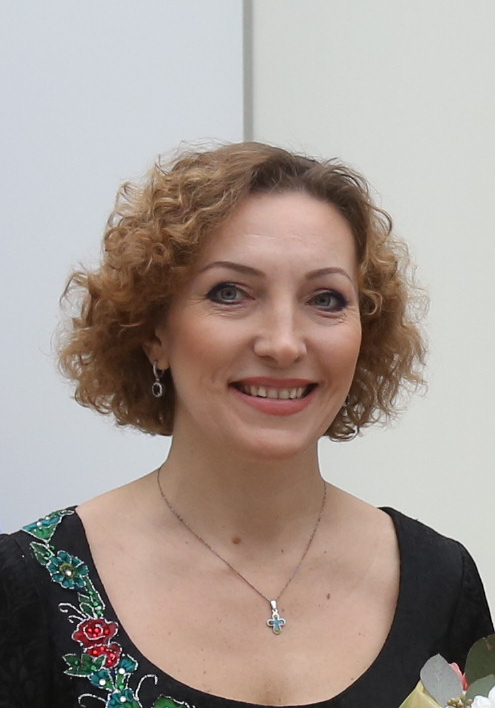 Анжеліна Швачка на церемонії вручення Національної премії України імені Тараса Шевченка 2016 року.